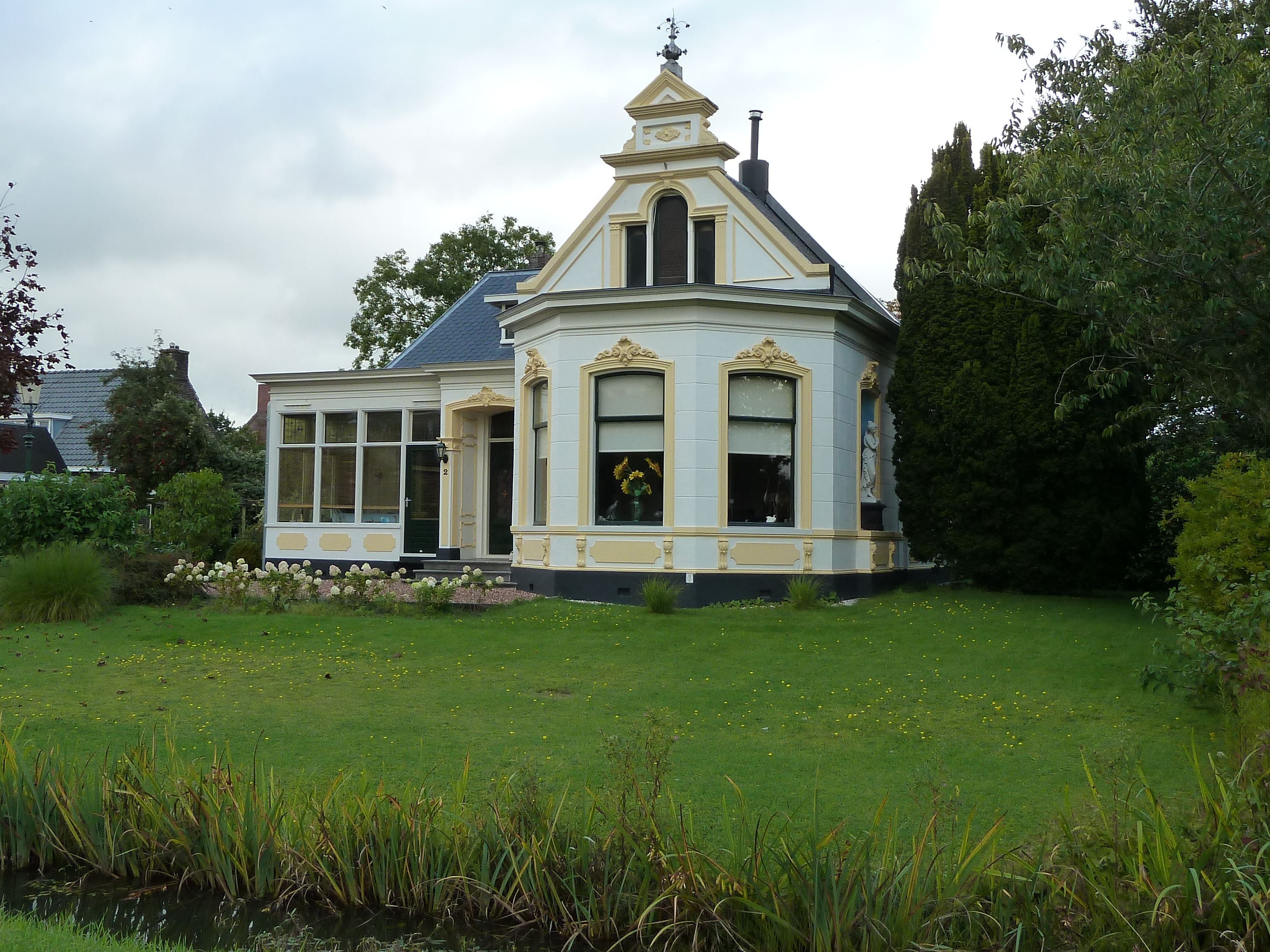 Rentenierswoning uit laatste kwart 19e eeuw, Leens